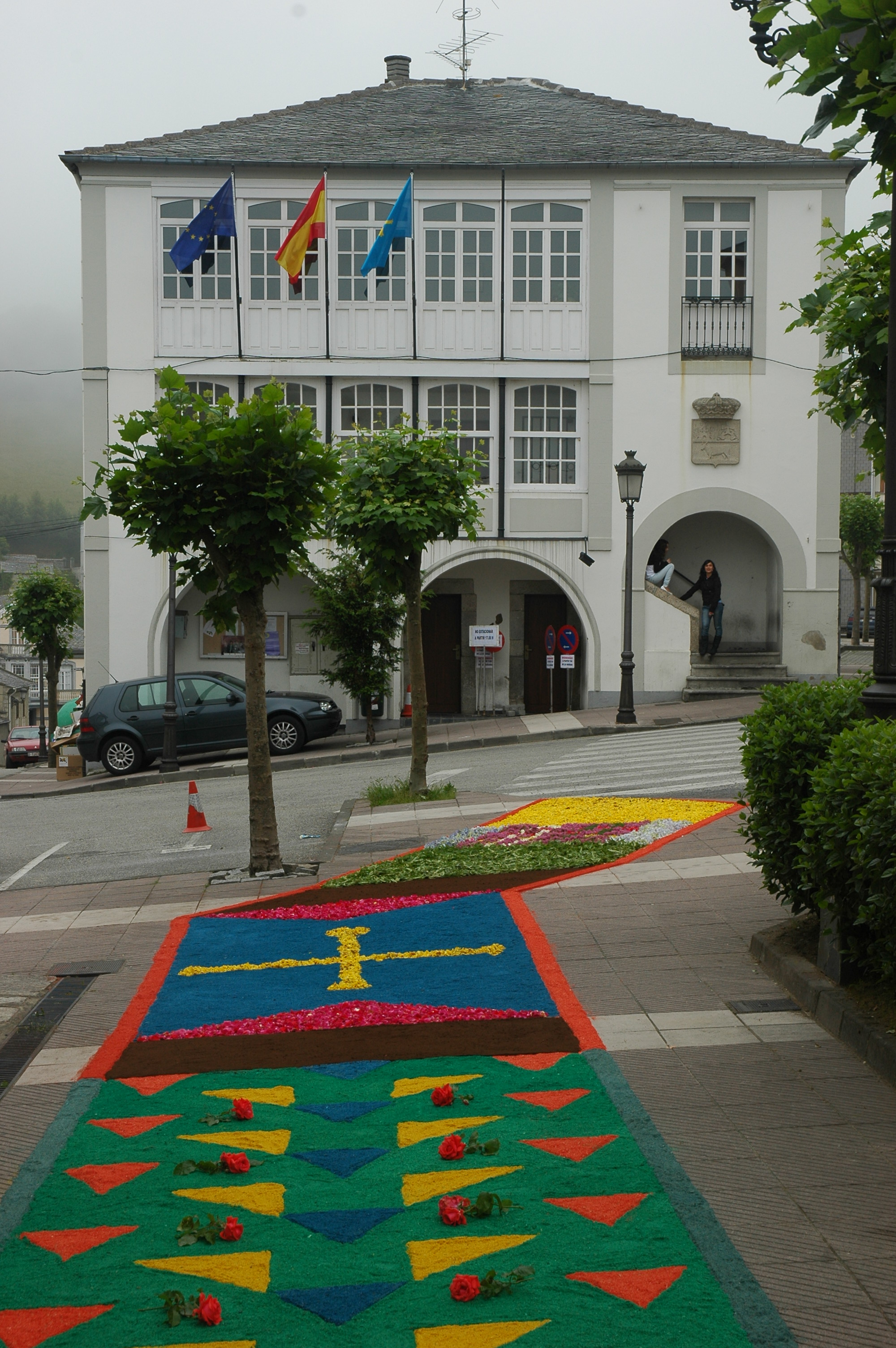 Alfombres de flores pa la procesión del Corpus Christi de 2009 en Bual. Al fondo, la casa conceyu.